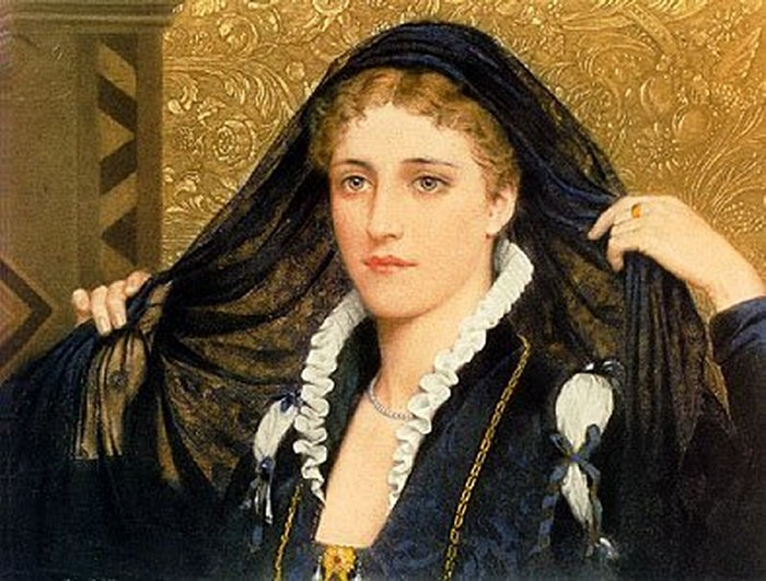 Olivia